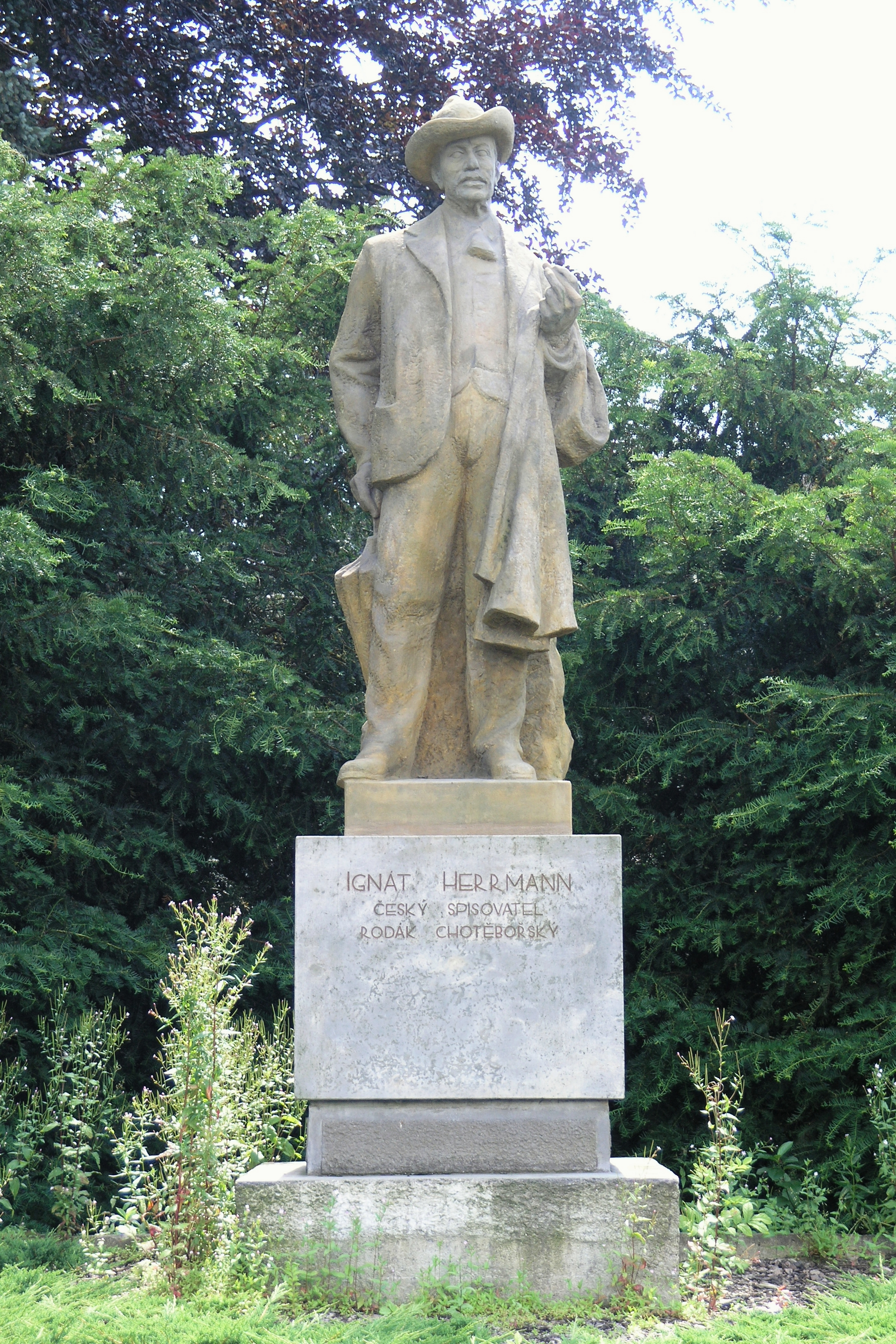 Chotěboř - Ignát Herrmann